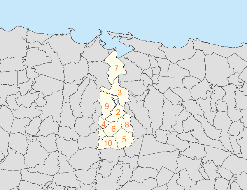 Stadtbezirke von Guaynabo, Puerto Rico, Karibik